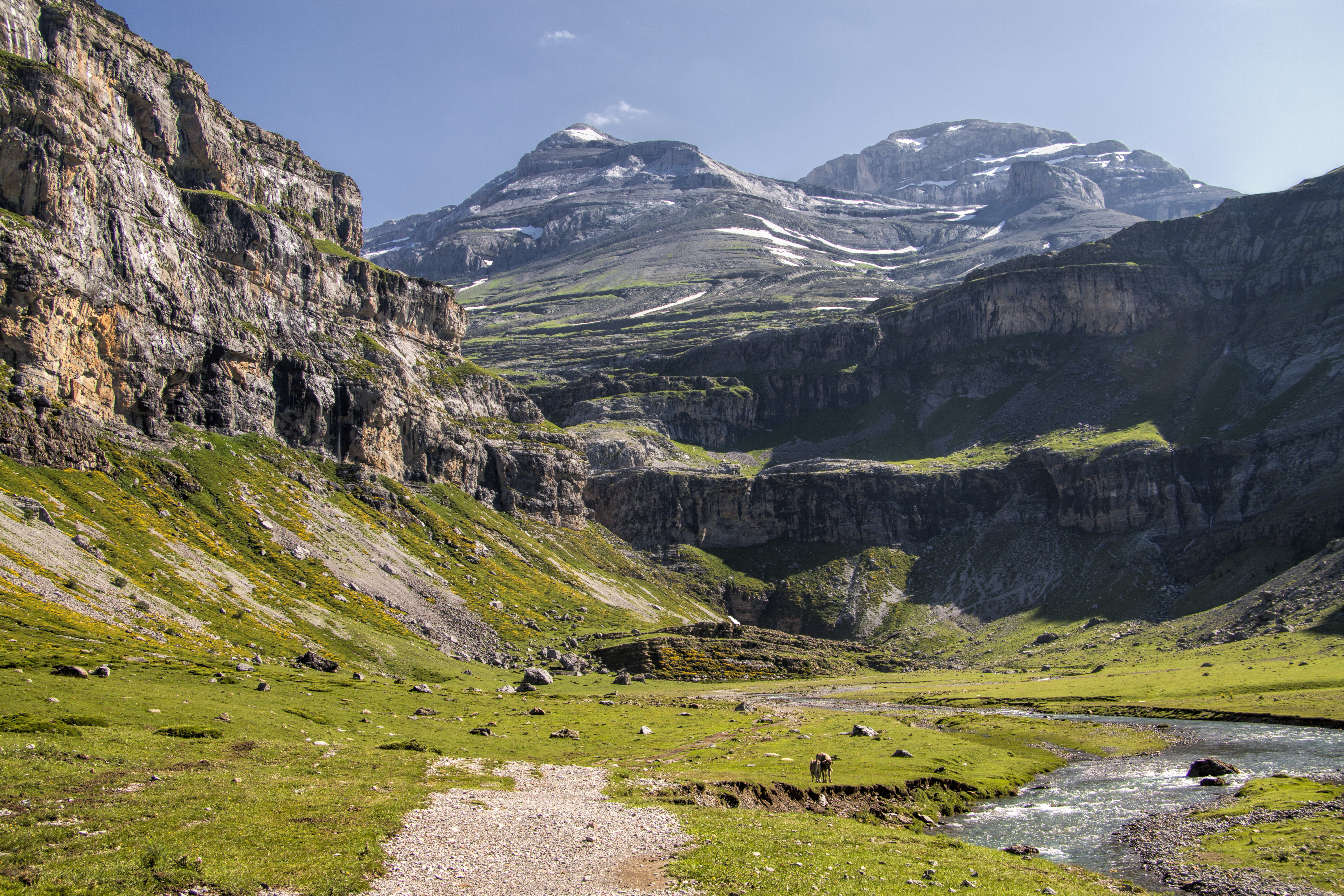 Circo de Soaso, Valle de Ordesa This is a photography of a Site of Community Importance in Spain with the ID: ES0000016. Natura2000 entry, EEA entry